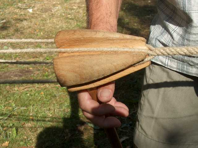 Rebslagerprop til at styre tovslagningen, så resultatet bliver jævnt